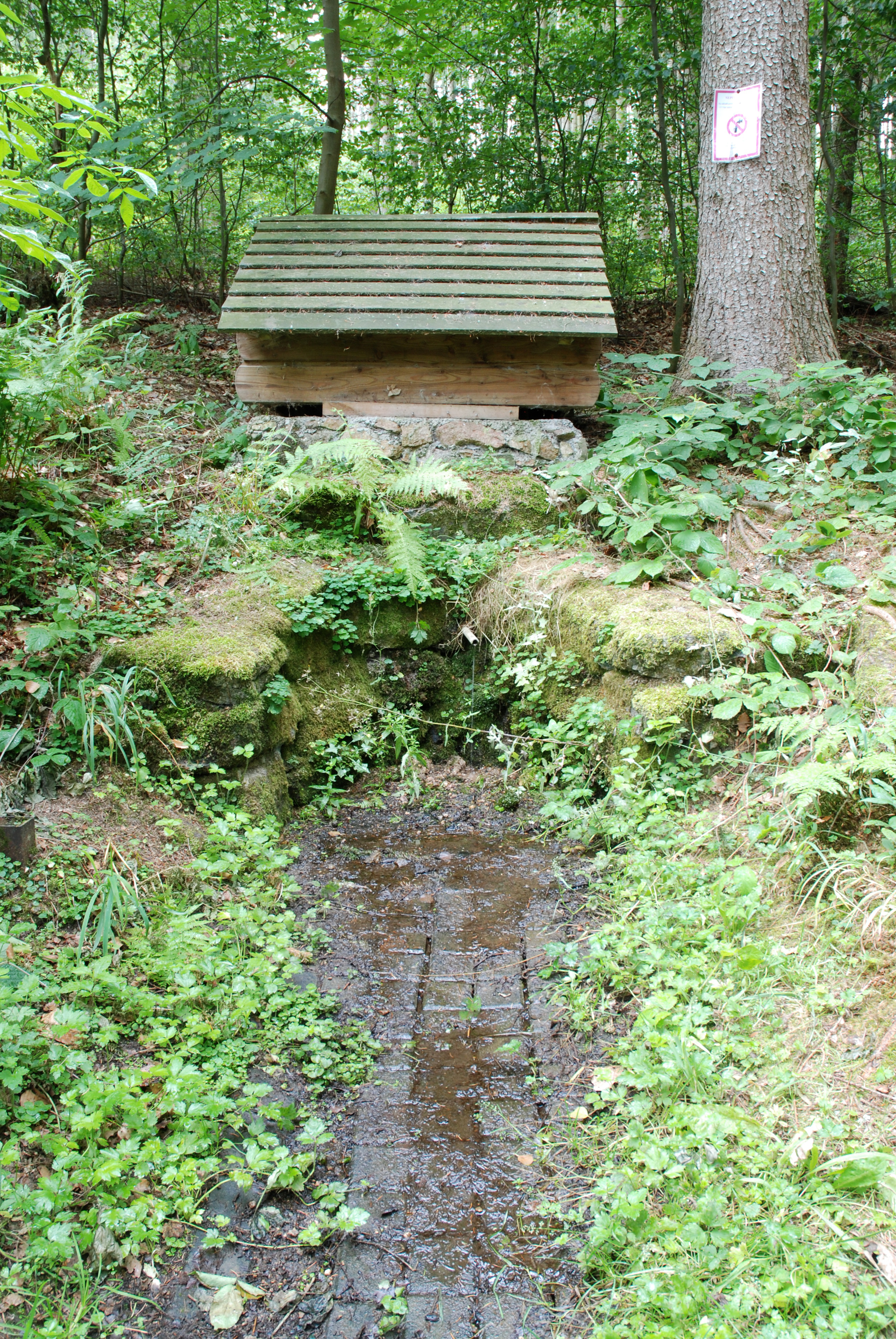 Pramen nazvaný Živá voda u altánu Básníků v karlovarských lázeňských lesích při Beethovenově cestě